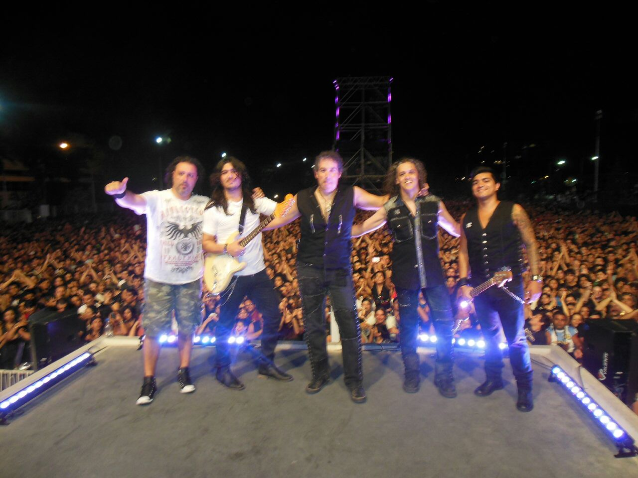 Arpeghy luego de telonear a Rata Blanca